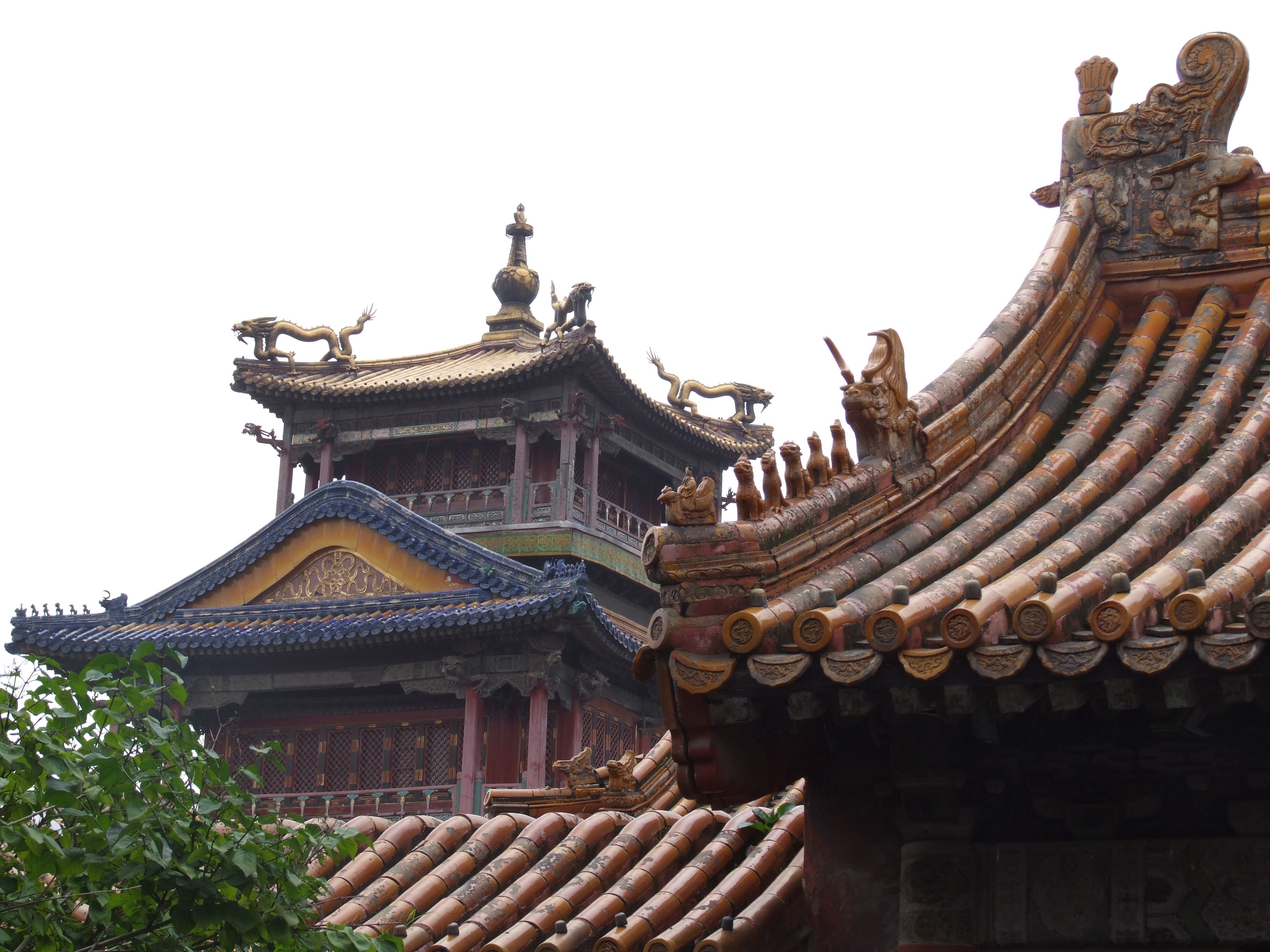 Verbotene Stadt